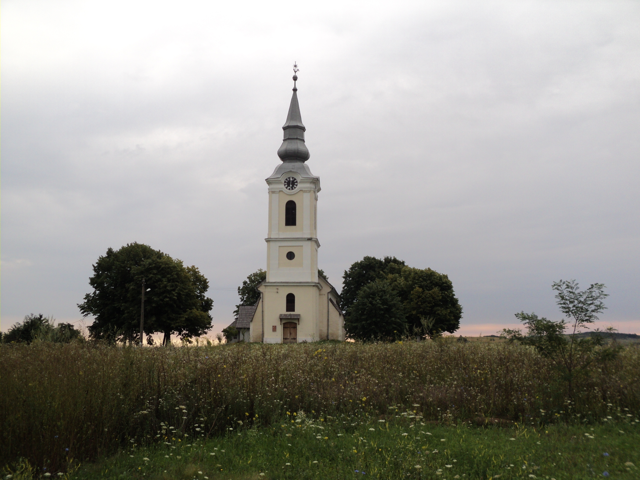 Síter temploma a tiszántúli református püspök Hunyadi Szabó Ferencnek egy 1794-ben megjelent művében szereplő leírással vonult be a művészettörténeti irodalomba. Hunyadi számára Síter elsősorban a templomban már akkor ismert falképeknek köszönhetően került etimológiai tárgyú példázatai sorába, de emiatt keltette fel később Révész Imre, Lugossy József és Rómer Flóris érdeklődését is.